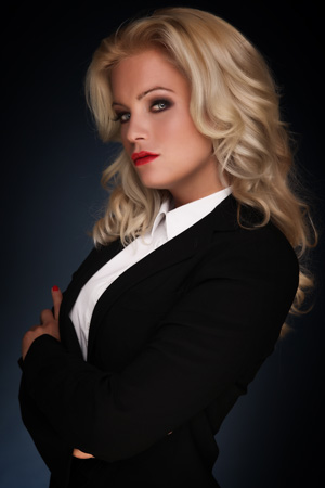 Katharina Kuhlmann beim Fotoshooting für die Tuning World 2009